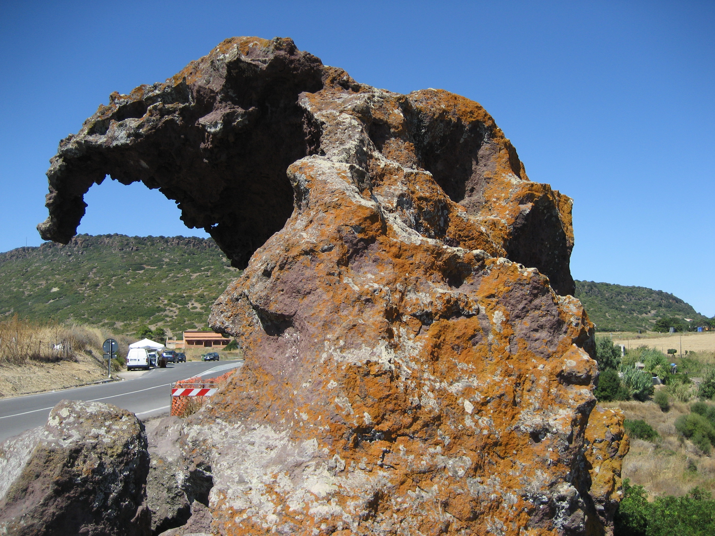 Roccia dell'elefante, Castelsardo, Sardegna